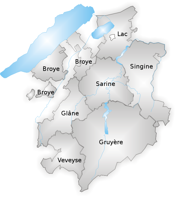 Carte du canton de Fribourg avec nom des districts Dessiné par Tschubby : File:Karte Kanton Freiburg Bezirke notext.png Noms des districts en français ajoutés par Cédric